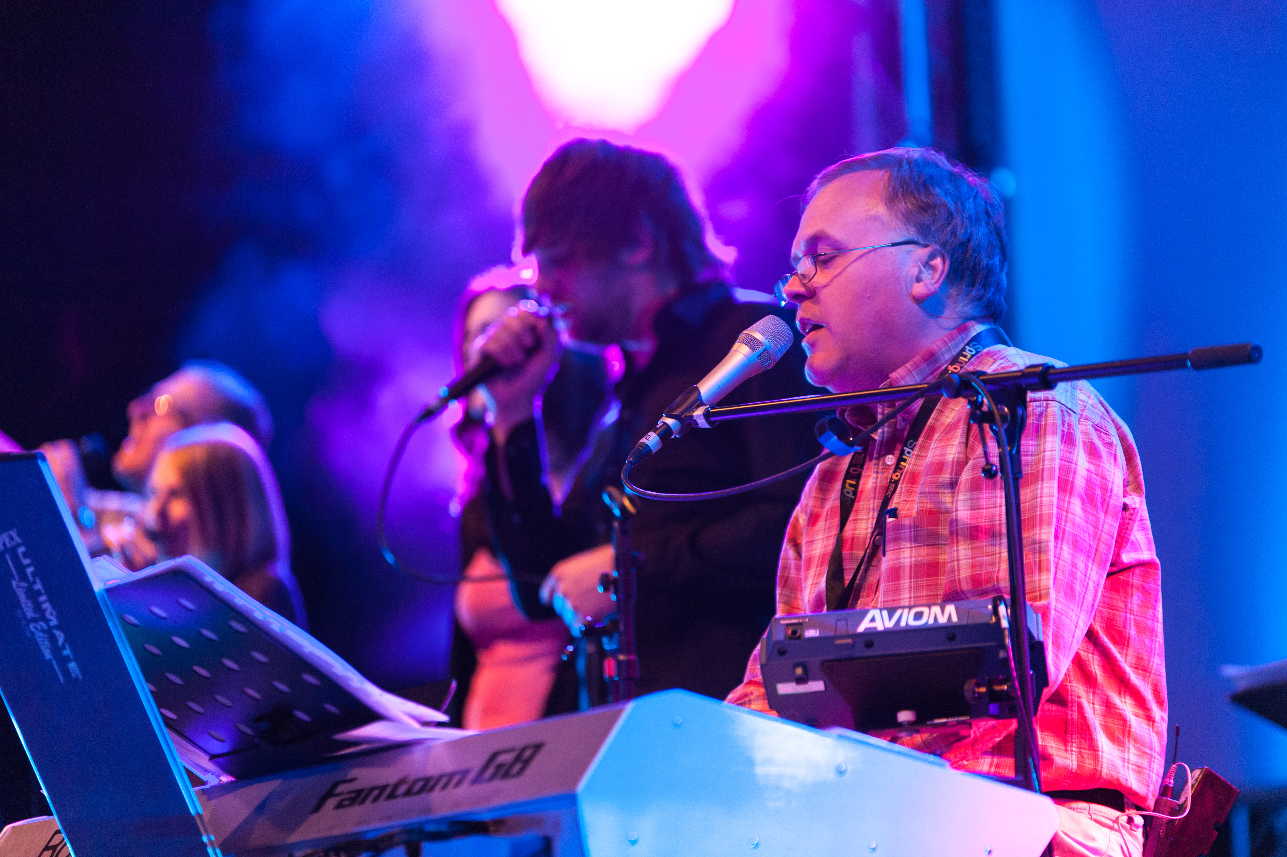 Gaetan Roy auf dem GemeindeFerienFestival SPRING 2012. Dieses Foto darf ohne Einschränkungen bei Namensnennung (SPRING / Nico Franz) verwendet werden.